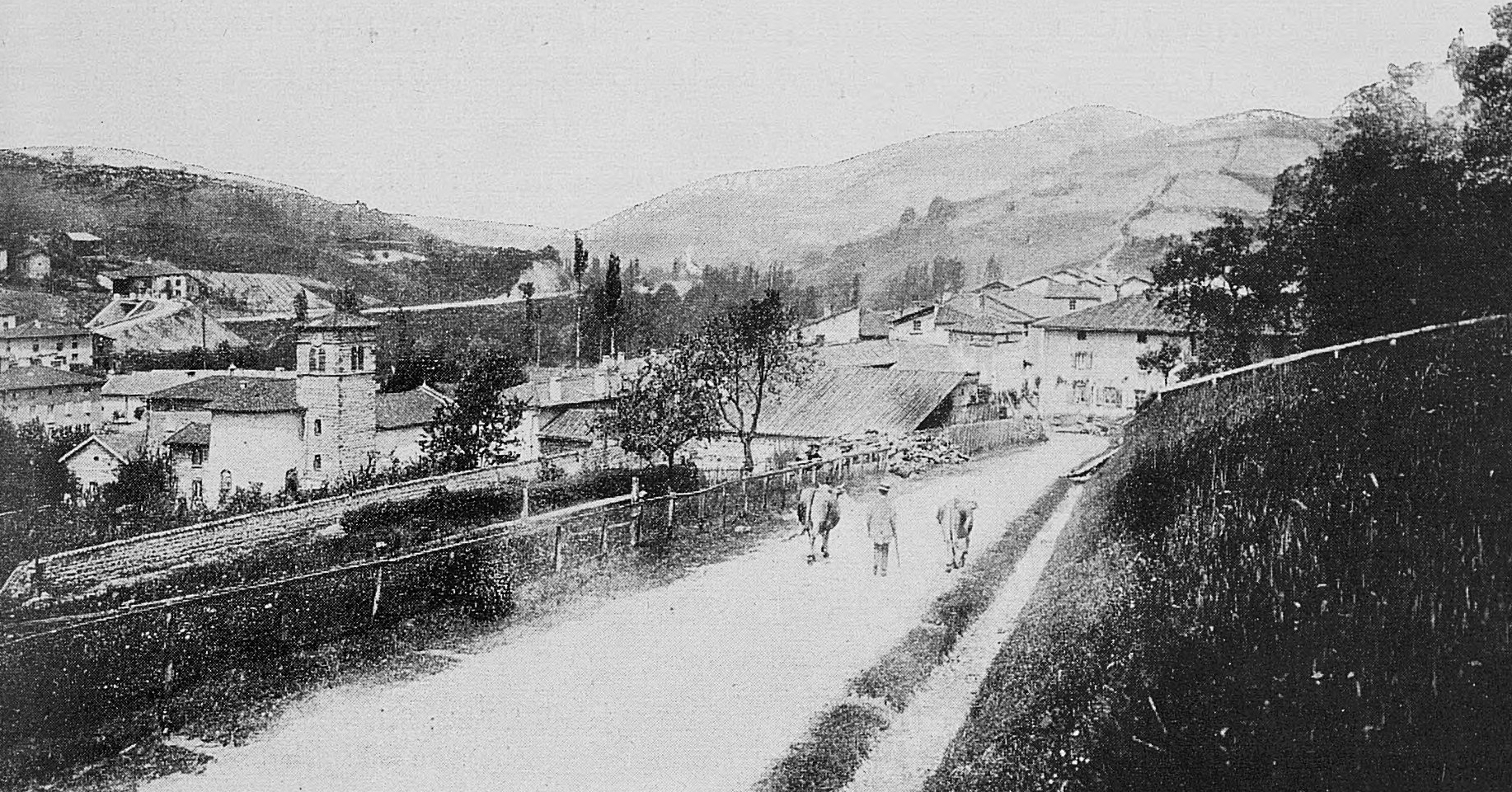 Dictionnaire illustré des communes du département du Rhône. Tome 1 / par MM. E. de Rolland et D. Clouzet.